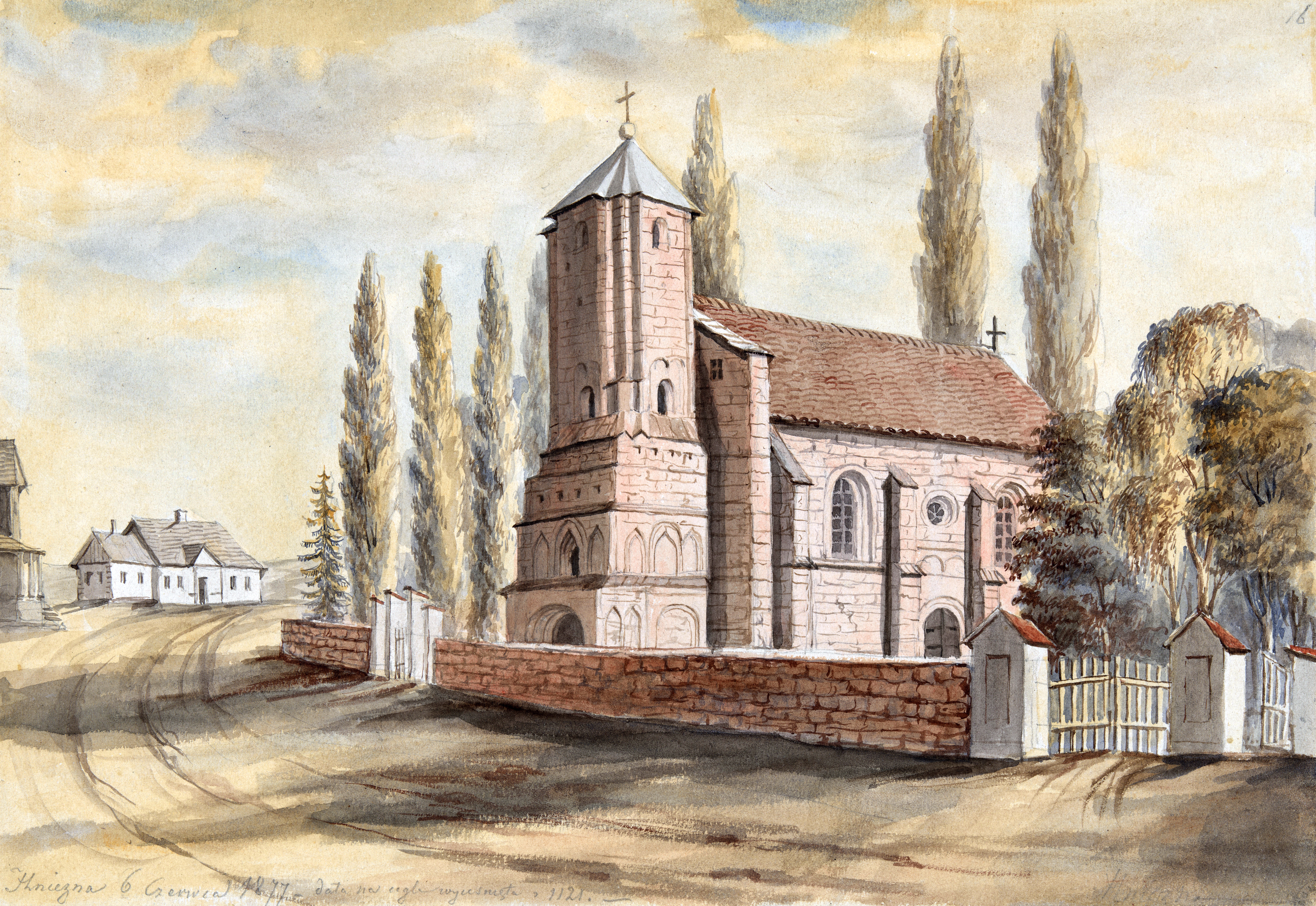 Беларуская (тарашкевіца): Гнезна (Hniezna). Касьцёл